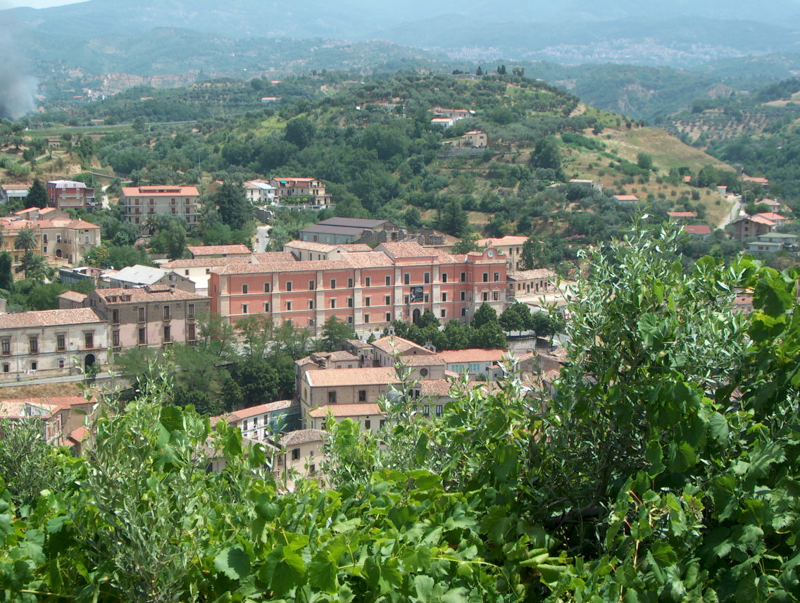 Cosenza Palazzo Arnoni. Pinacoteca Nazionale.